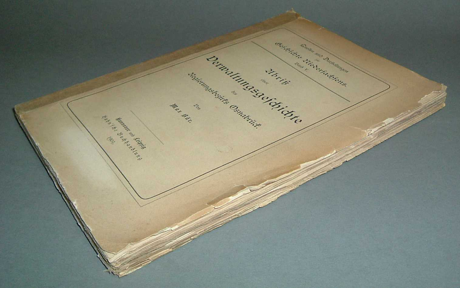 Interimseinband